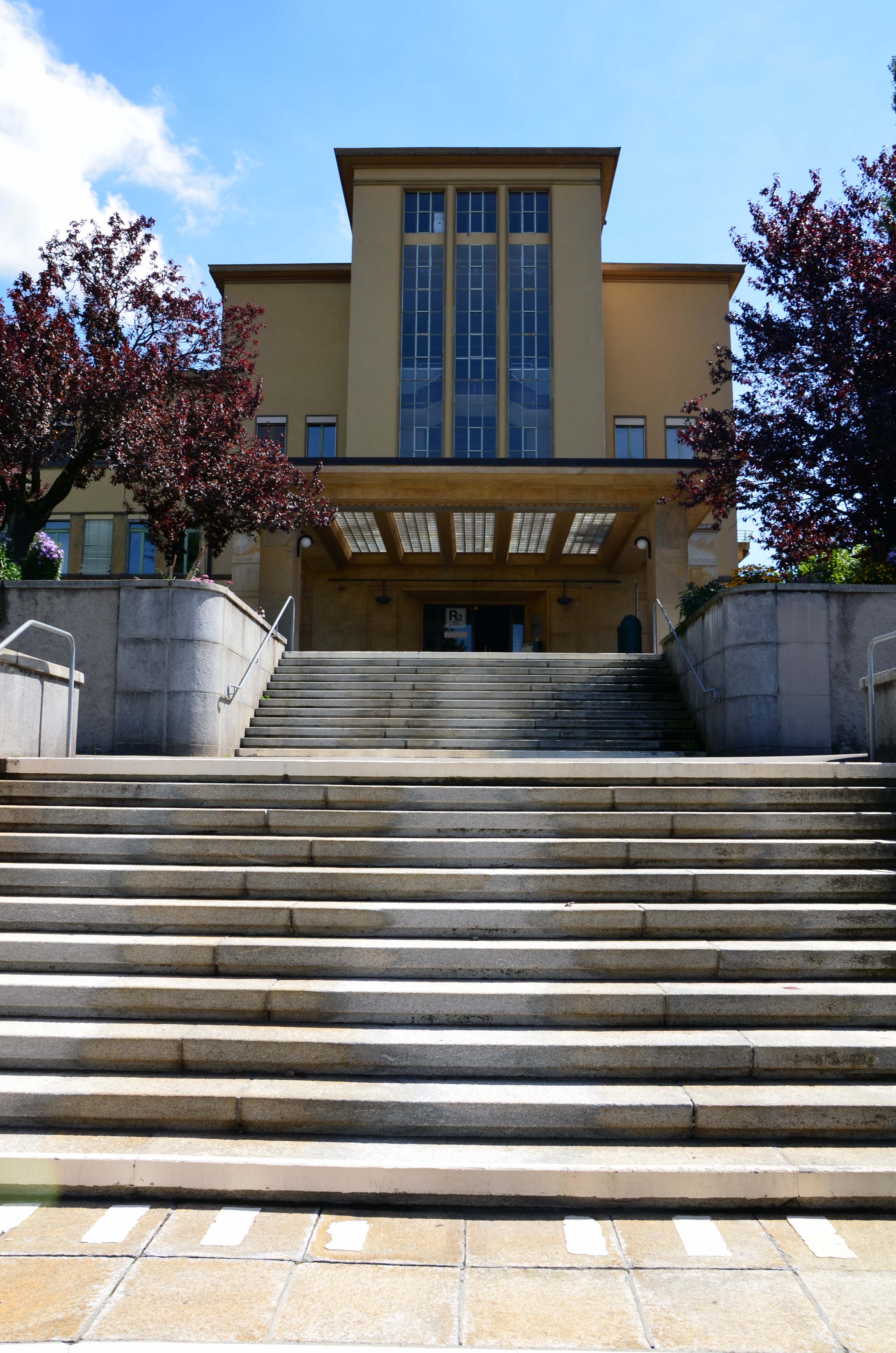 Extrêmité ouest de l'hôpital Nestlé, bâtiment faisant partie du Centre hospitalier universitaire vaudois (CHUV) de Lausanne (Suisse)